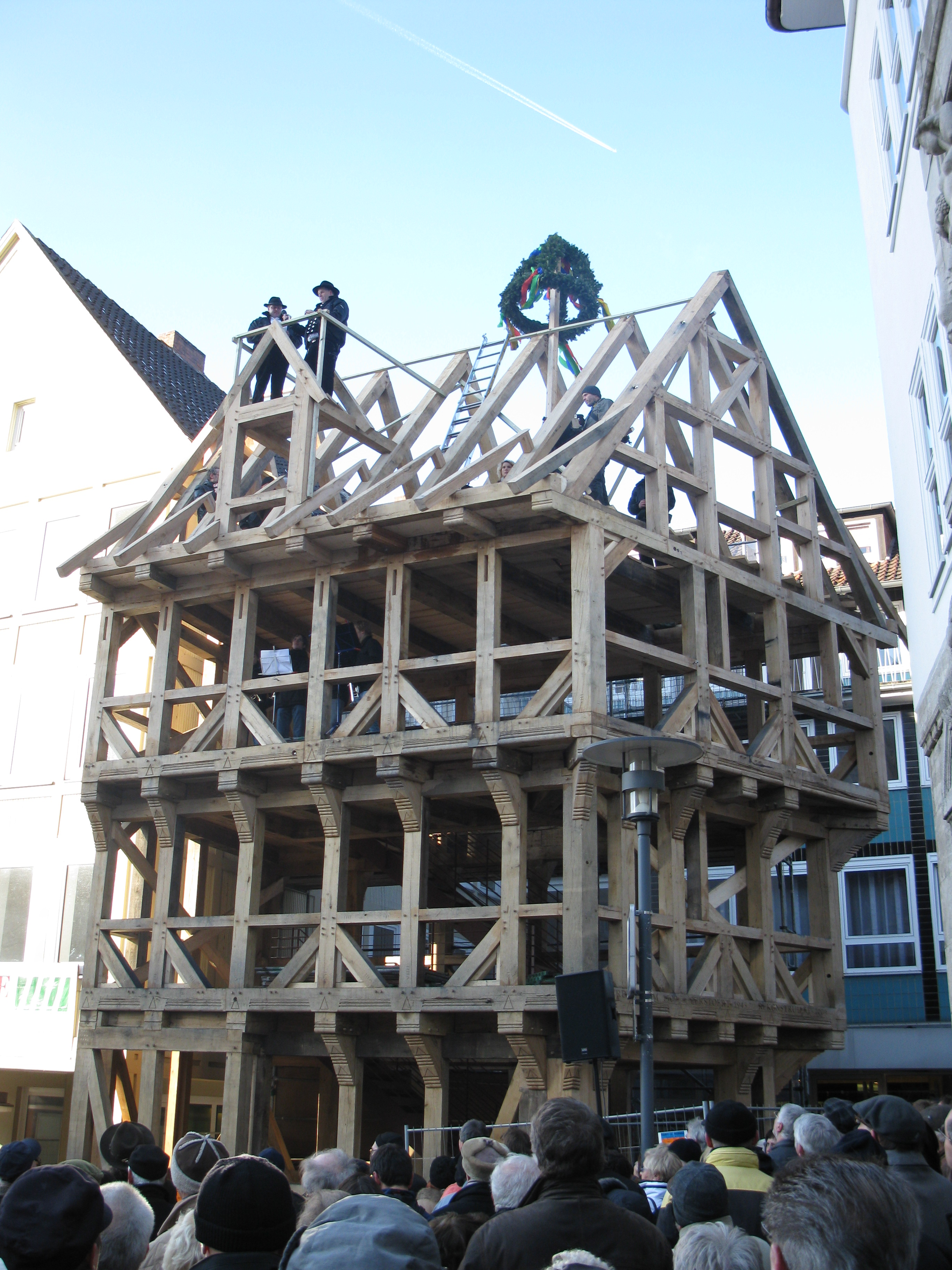 Pain de Sucre renversé de Hildesheim. Fète du bouquet.